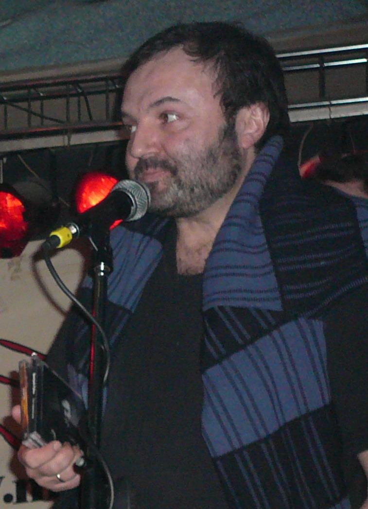 Дмитрий Рубин